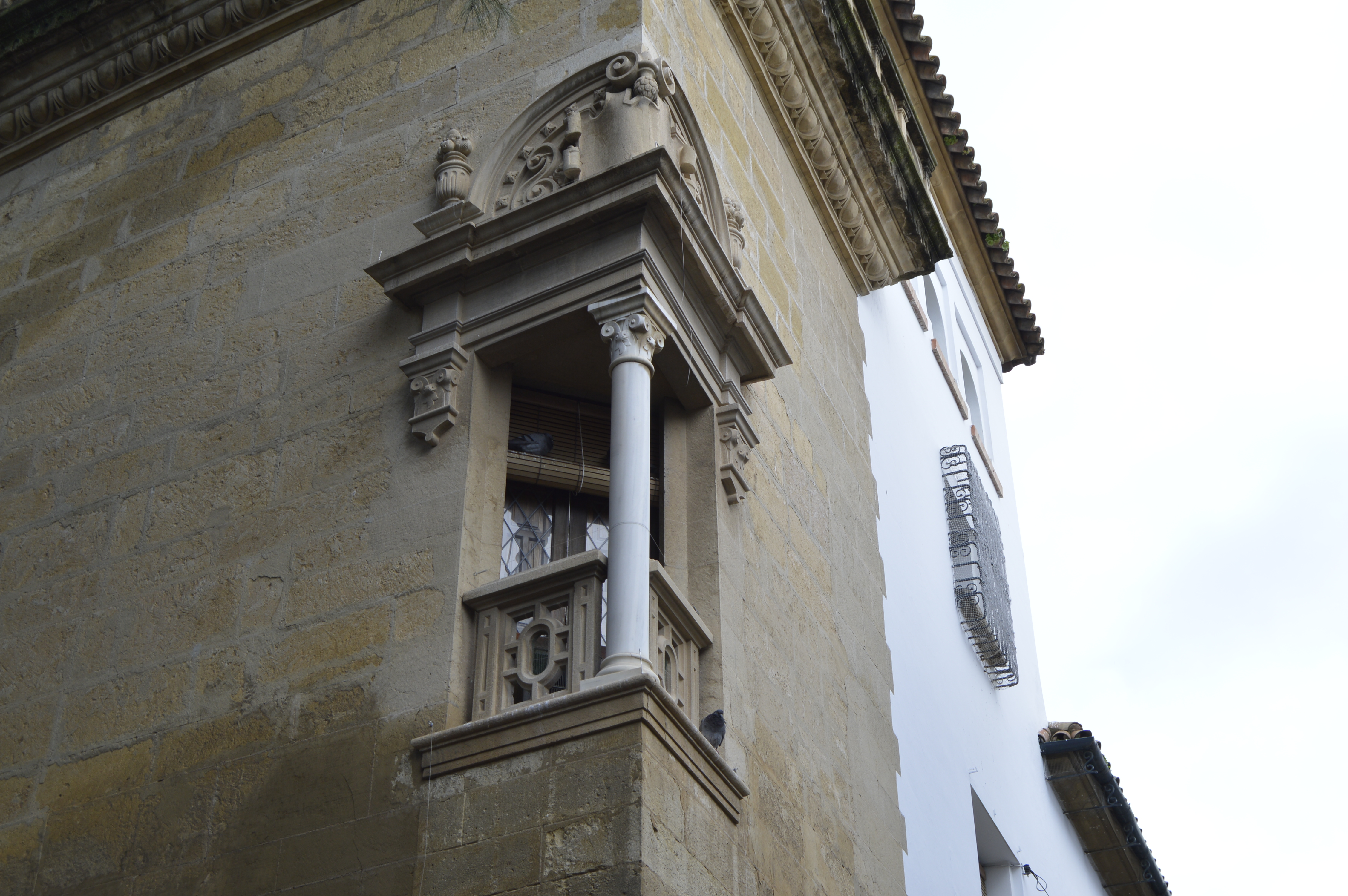 Balcon en esquina